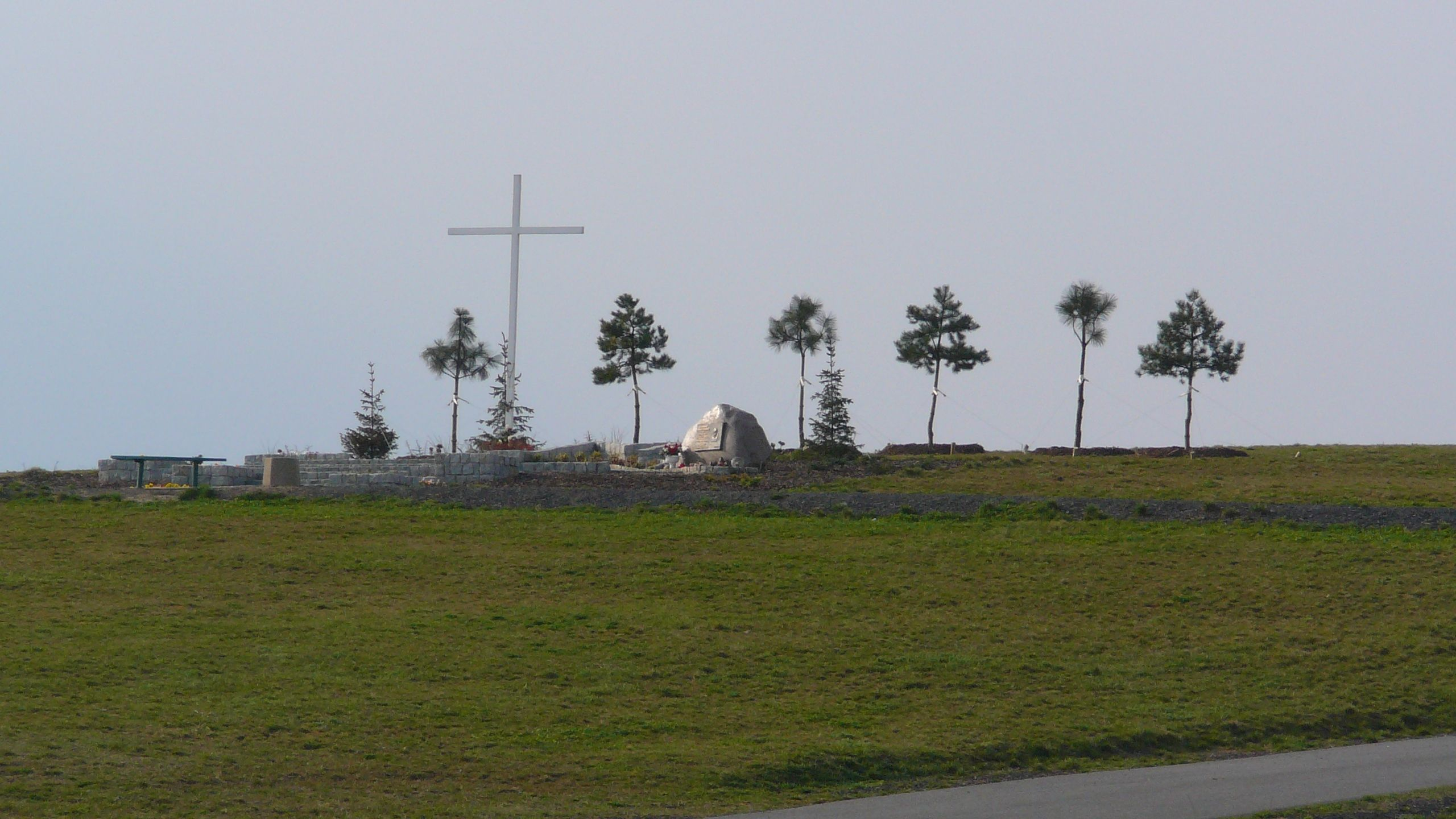 Szczyt wzniesienia z miejscem upamiętniającym śmierć papieża Polaka Jana Pawła II